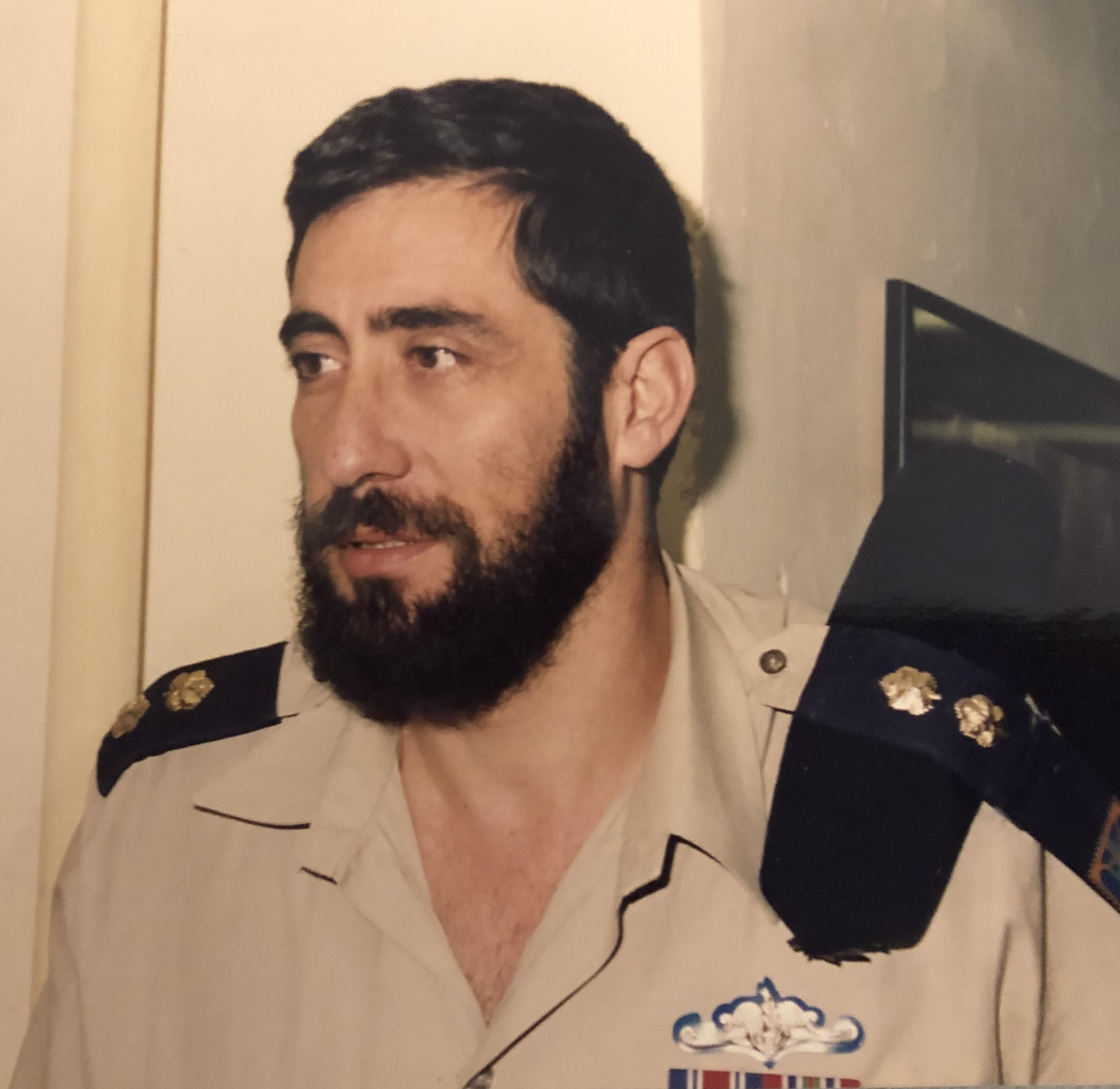 סא"ל אלי רונן מפקד פלגה 33